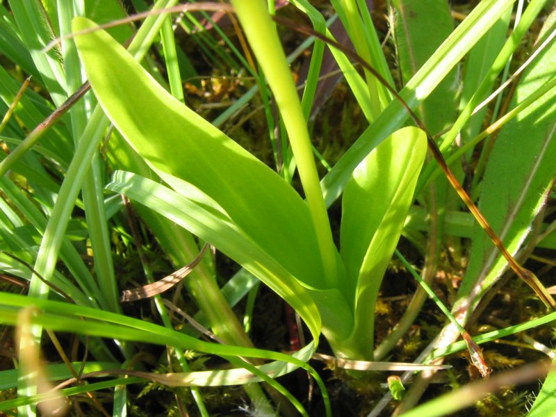 Sumpf-Glanzkraut Liparis loeselii, Grundblätter, Müritz-Gebiet, FFH-Art